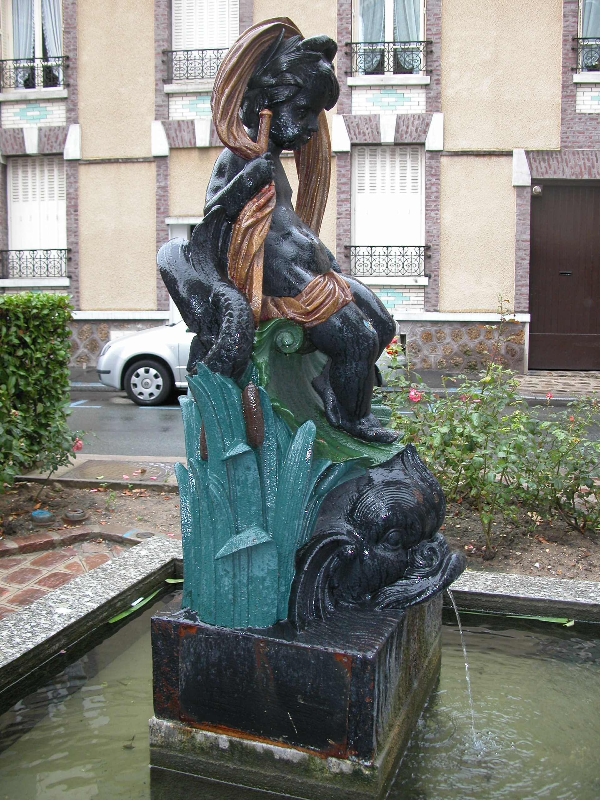 Fontaine des Rosettes, at Fontenay-sous-Bois